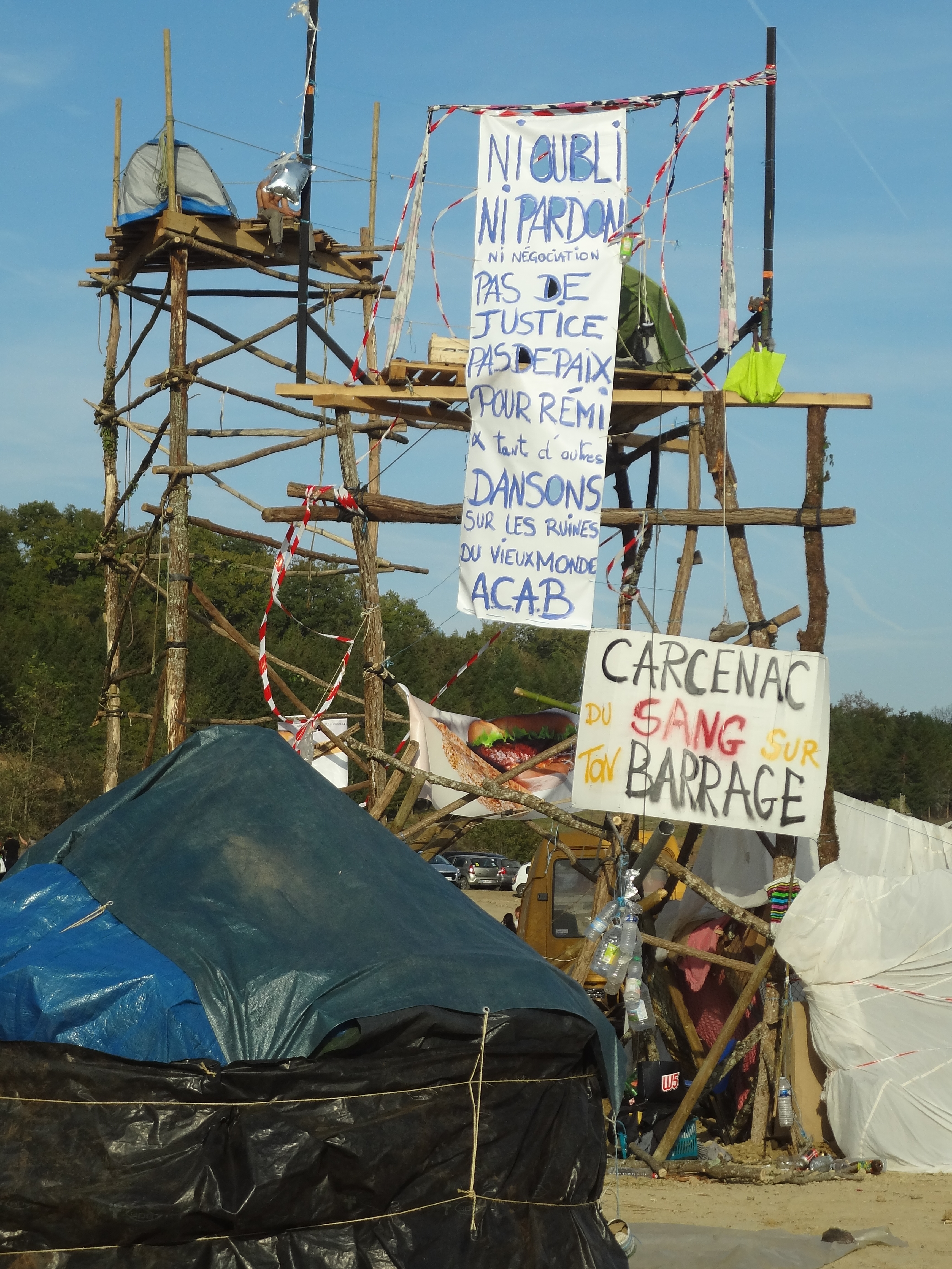 Tours de guet et de vie, et banderoles, au Fort du Testet